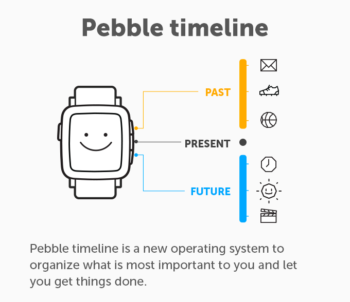 the pebble os design